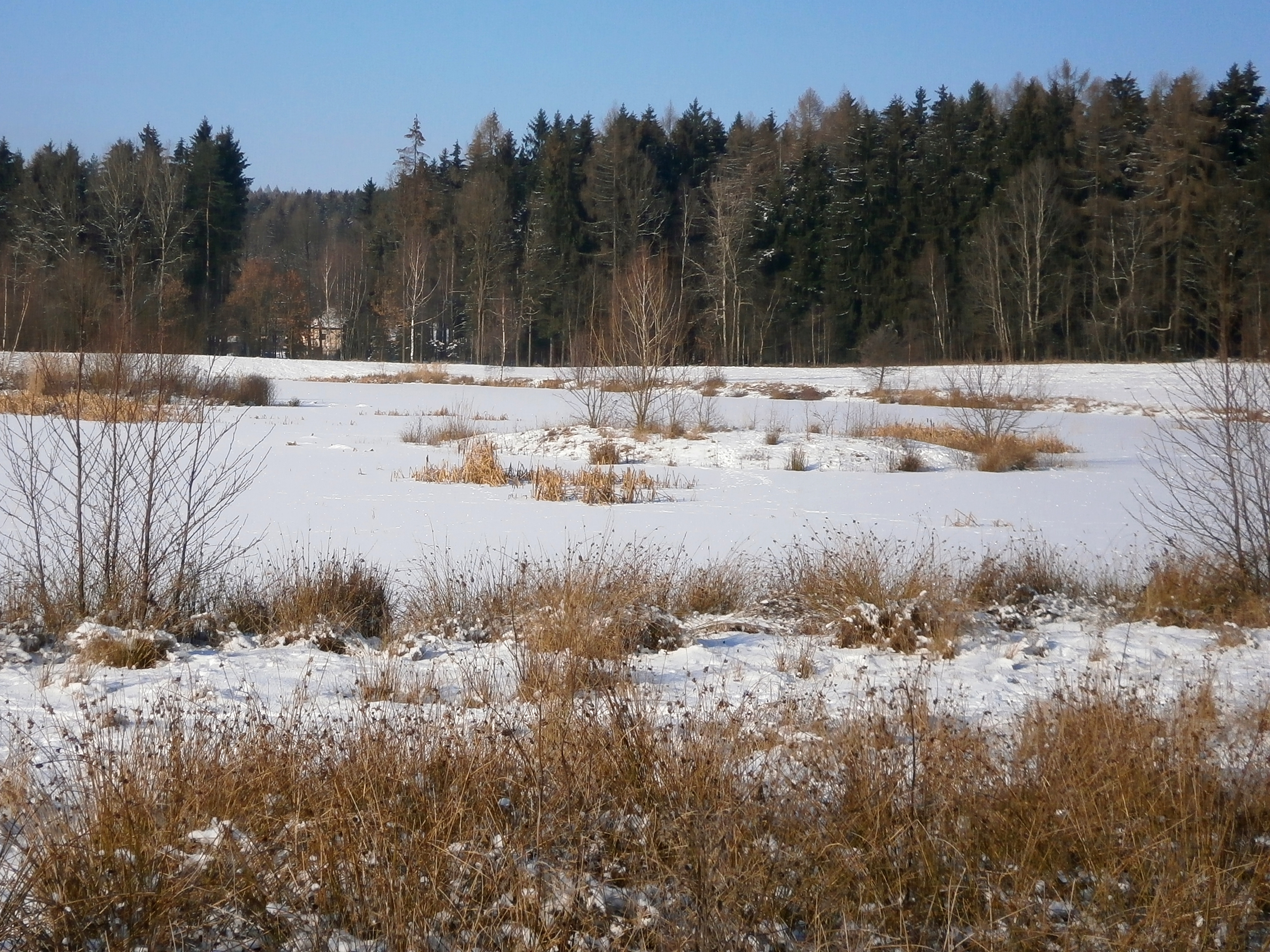 Rybník, který byl zřízen manžely Chmelařovými při cestě z Mezilečí do Prorub. Autorem projektu z roku 2010 je Jan Tylš z Trutnova.